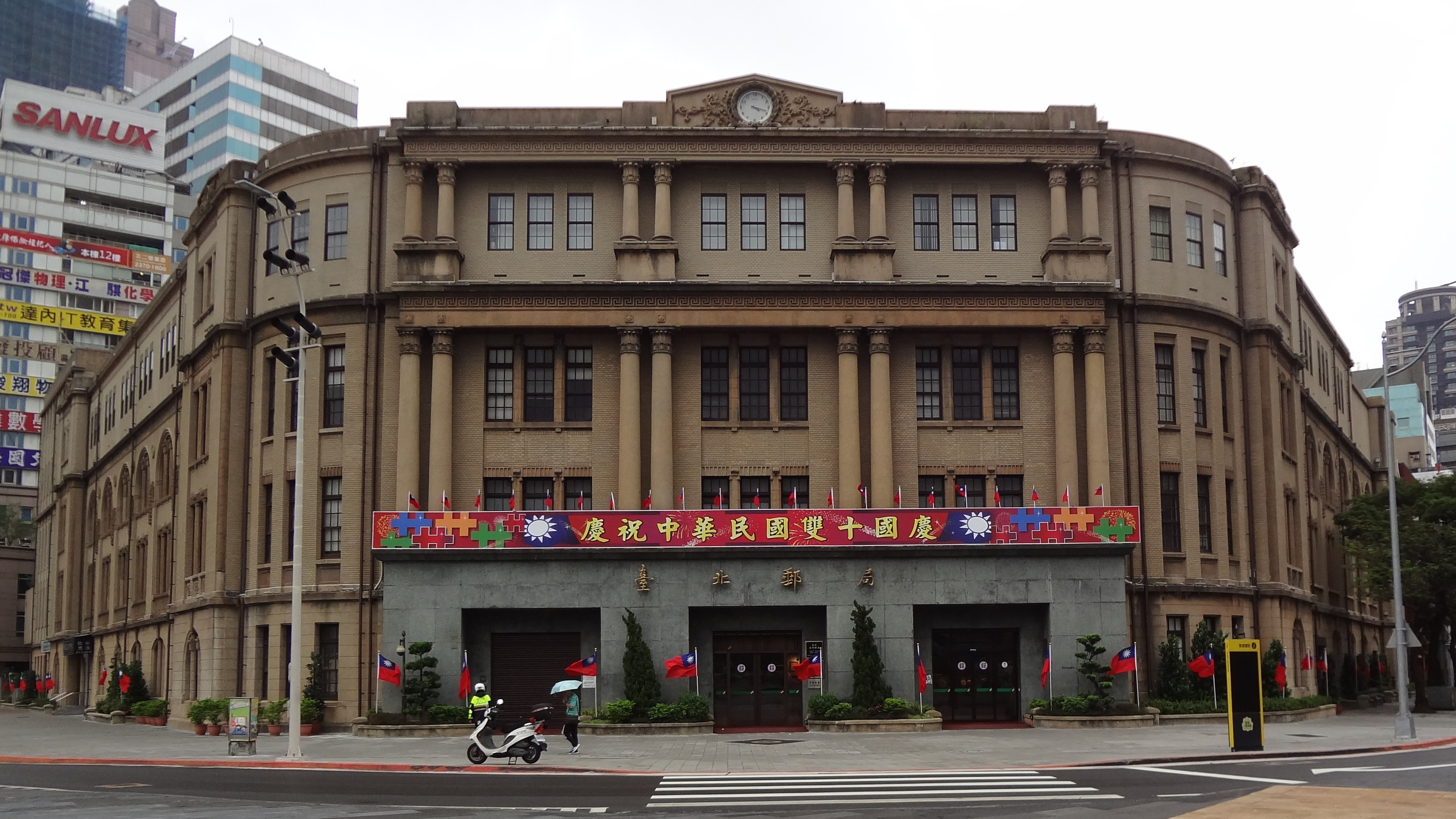 臺北郵局慶祝中華民國國慶，正面掛出慶祝國慶牌子，慶祝國慶牌子上方與一樓外圍插國旗。